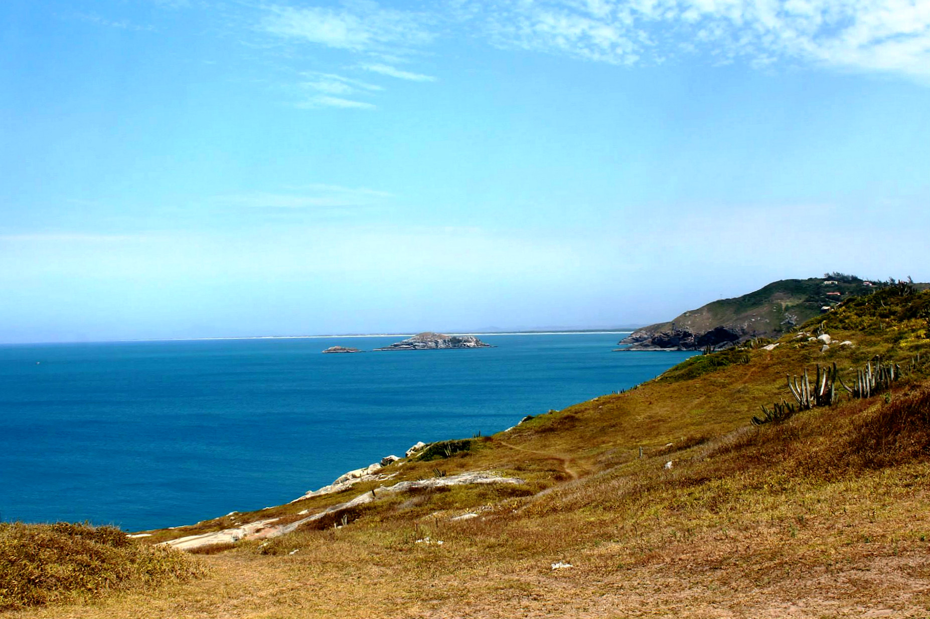 Costão do Atalaia localizada no Municipio de Arraial do Cabo-RJ, onde fica situada no Reserva Extrativista Marinha do Arraial do Cabo